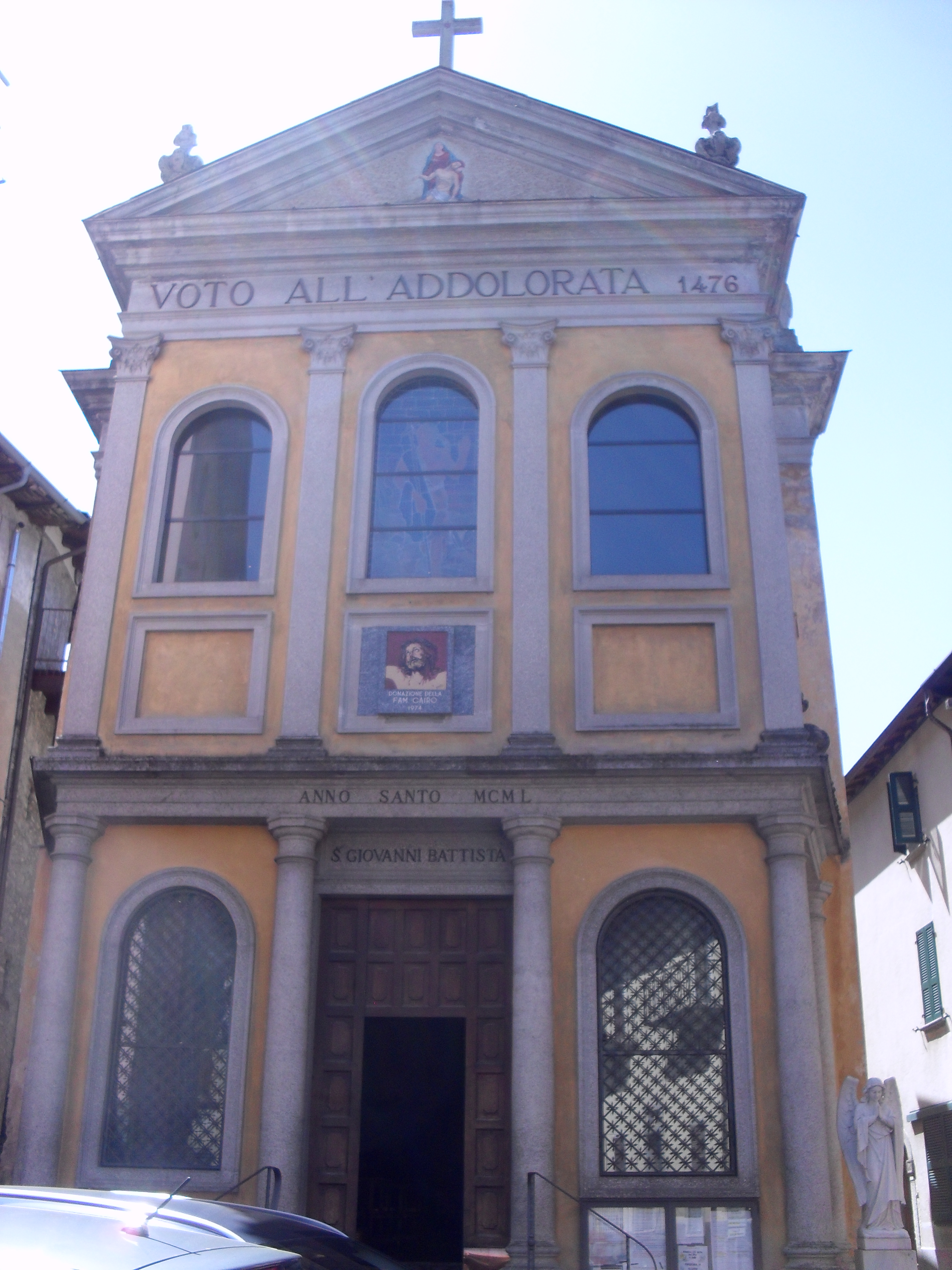 Facciata della chiesa di San Giovanni a Schignano